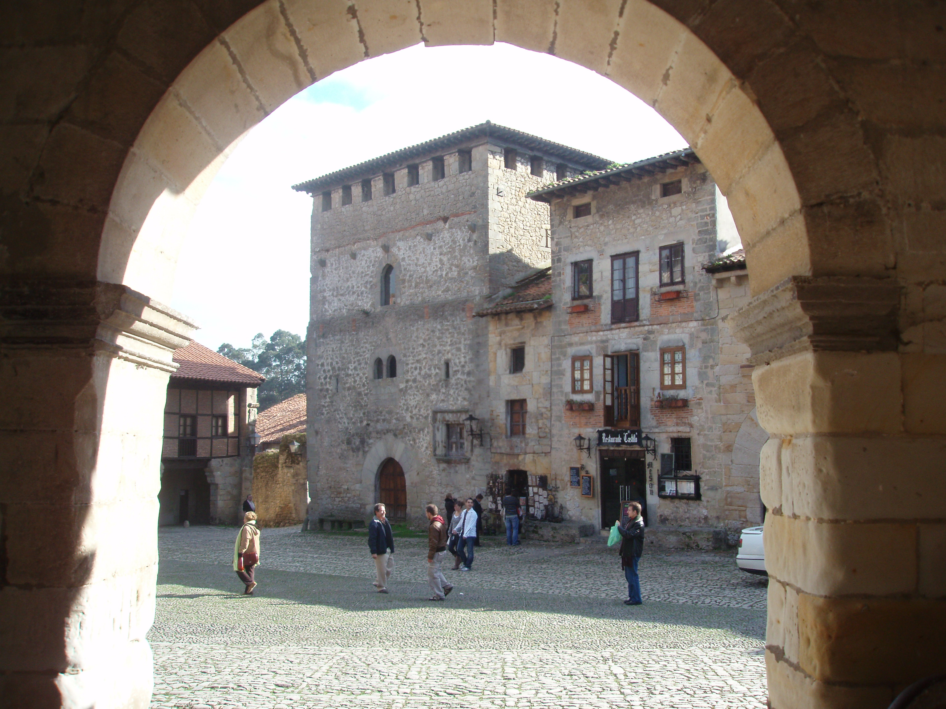 Plaza Mayor, Santillana del Mar.